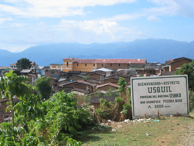 Entrada a usquil